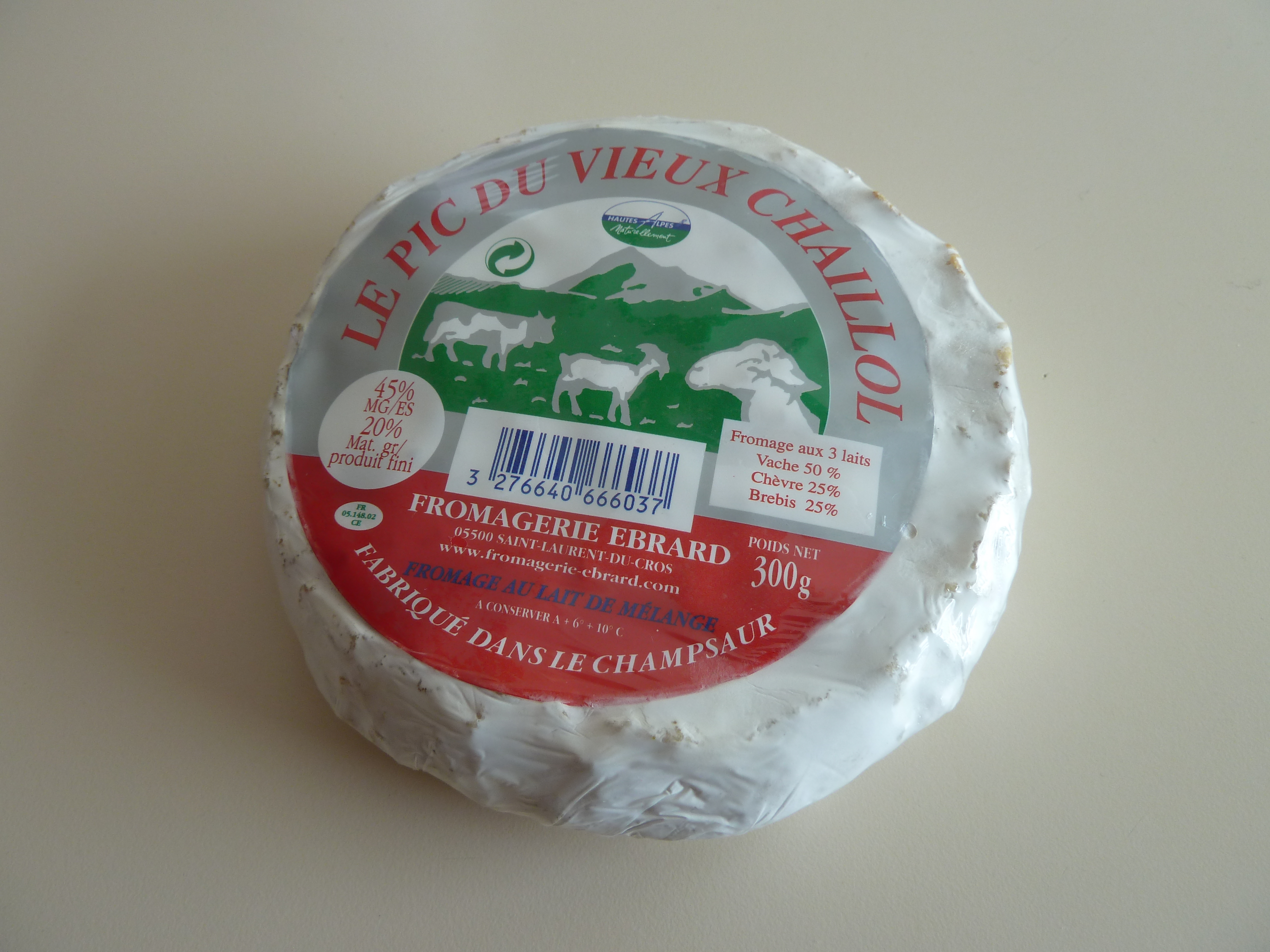 Fromage « Le Pic du Vieux Chaillol » Fromage aux trois laits: Vache 50%, Chèvre 25%, Brebis 25% 45% MG/ES, 20% Mat. gr/produit fini Fromagerie Ebrard 05500 Saint-Laurent-du-Cros Fromage au lait de mélange Fabriqué dans le Champsaur